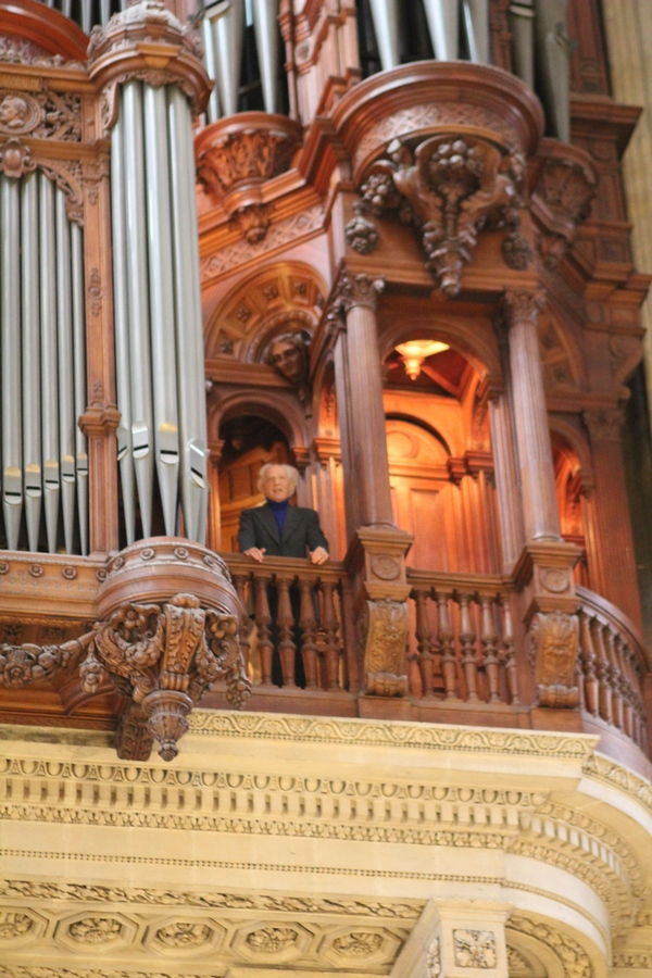 Jean Guillou auf der Orgelempore der St. Eustach